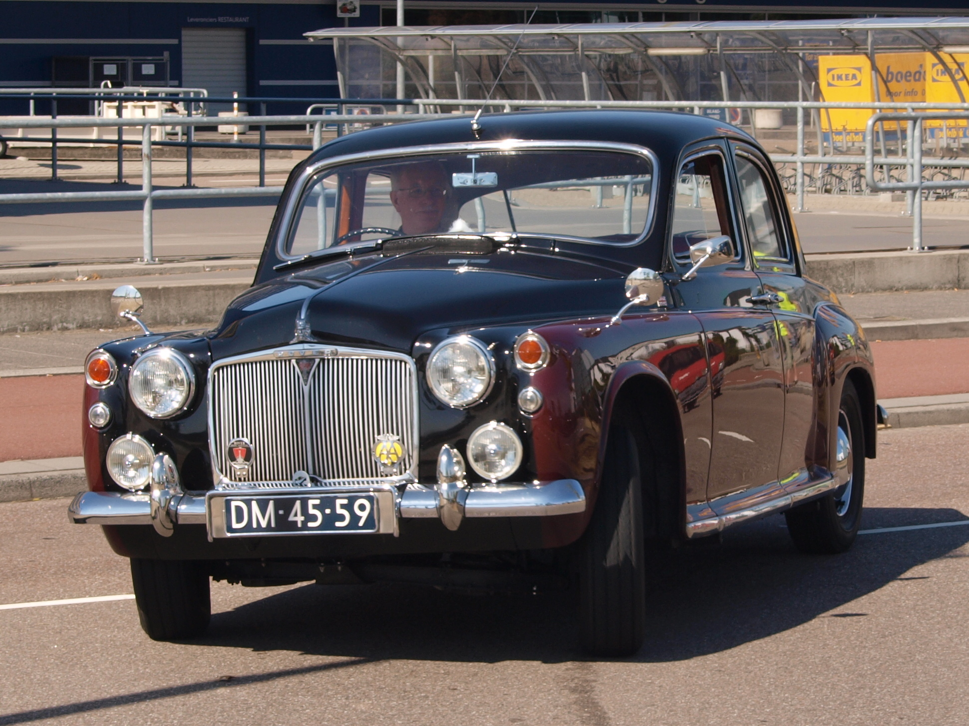 Rover P4 DM-45-59